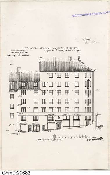 Ritning av Hjalmar Zetterström i april 1924 till nybyggnad av hörnhuset Föreningsgatan 39-Erik Dahlbergsgatan 38. Fastighetens byggår är 1925.